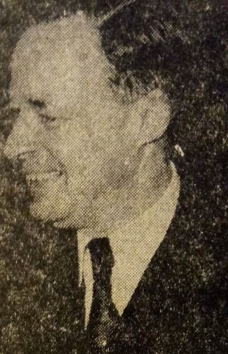 M. Roger Seydoux s'est rendu à Dar El Bey pour féliciter M. Bourguiba : l'entretien a duré 90 minutes